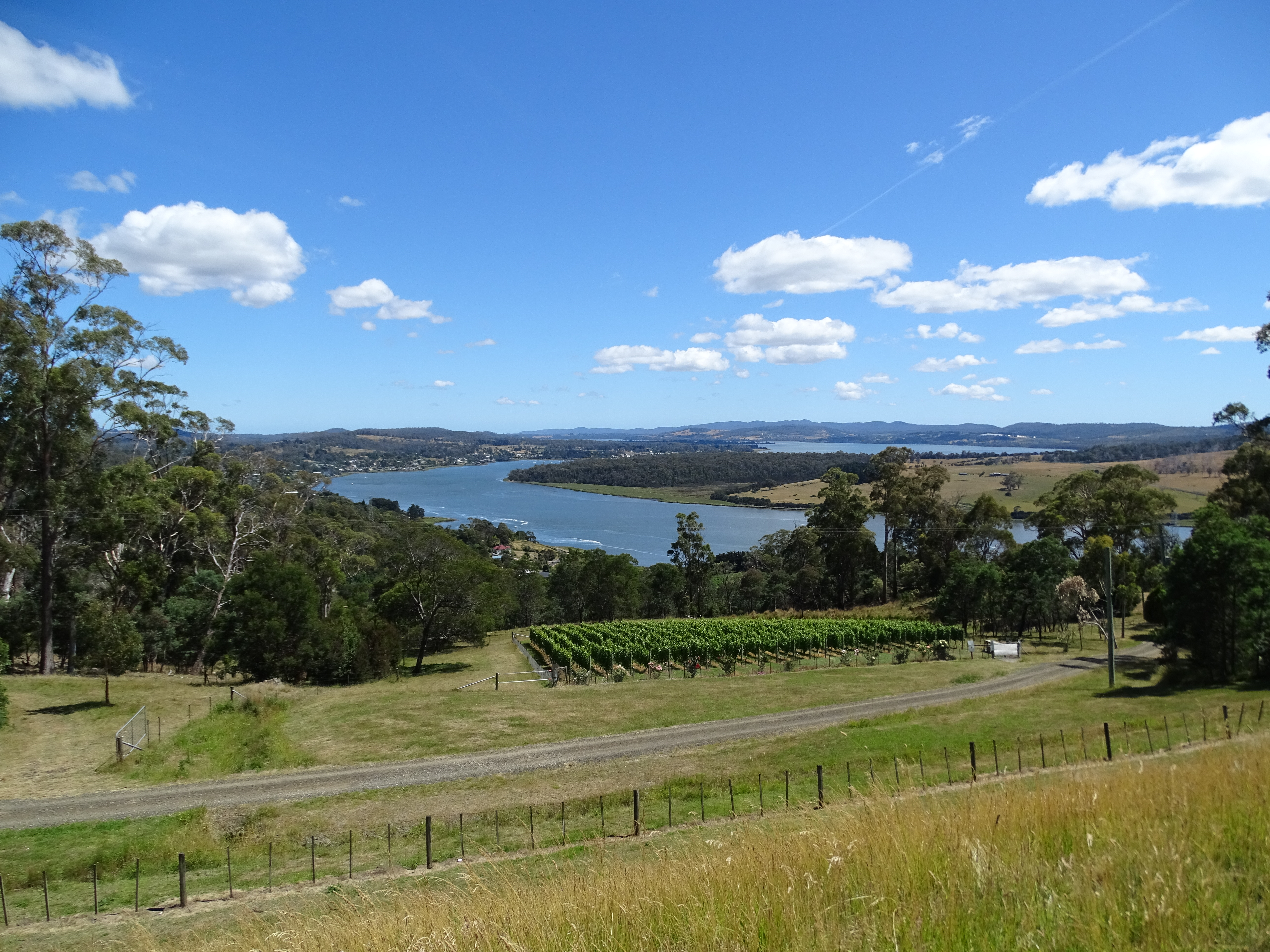 Tamar River und die Weinstraße im Tal Tamar Valley (Tamar Valley Wine Route), Nordtasmanien, Australien; fotografiert auf der Höhe von Rosevears bei Exeter